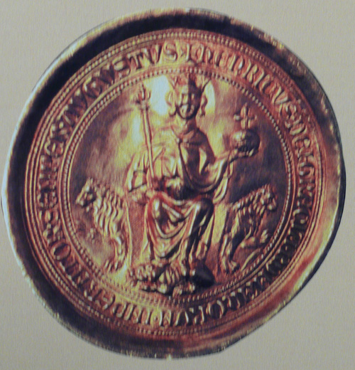 Pečeť Jindřicha VII. Lucemburského